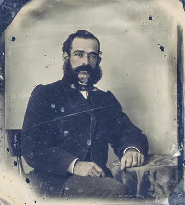 Fotografía de Miguel Grau, posiblemente hecha por Courret